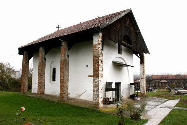 Црква Св. Николе у Баљевцу